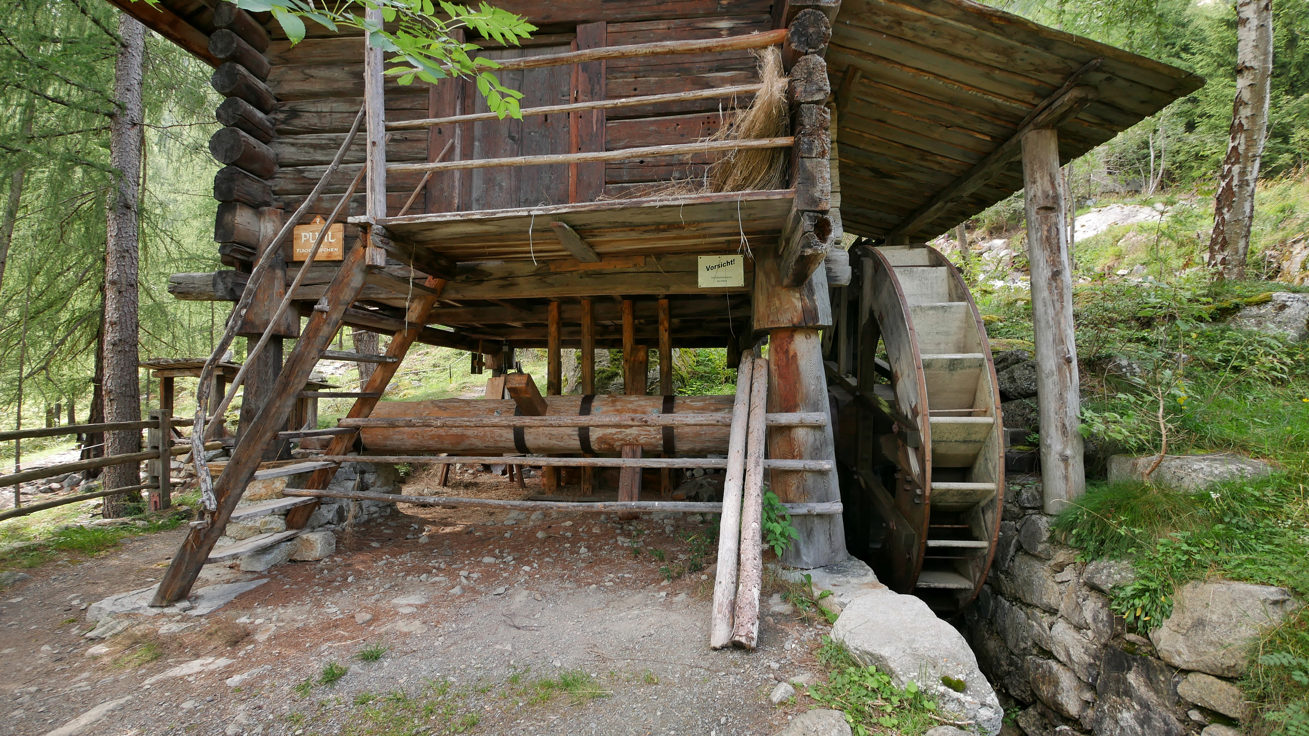 Ötztaler Freilichtmuseum, Längenfeld Ötztal/Tirol - Wassergetriebene Flachsbreche